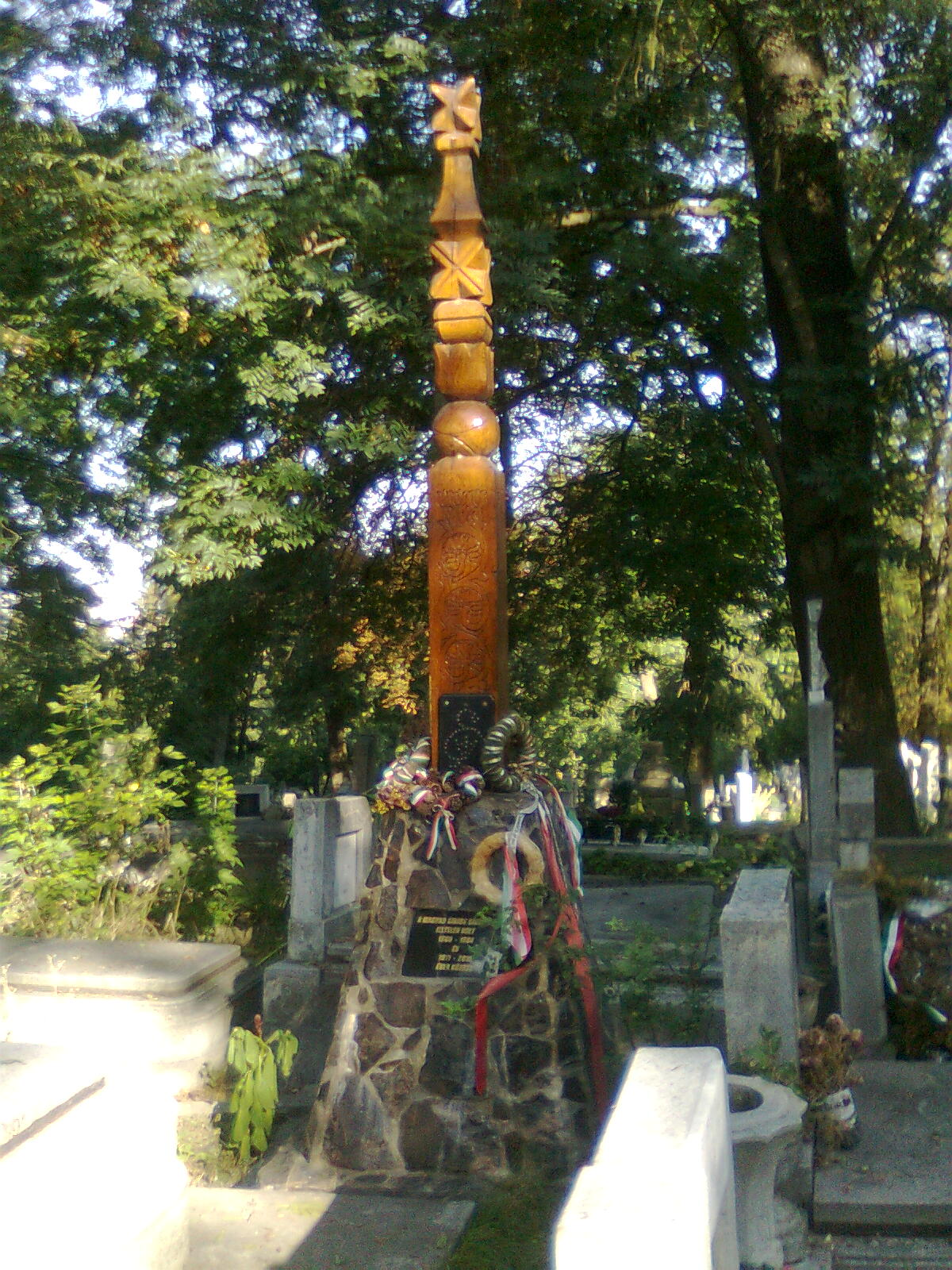 Kopjafa Bolyai János eredeti sírhelyén, Marosvásárhely (Bandi Árpád nyugdíjas matematikatanár jóvoltából))